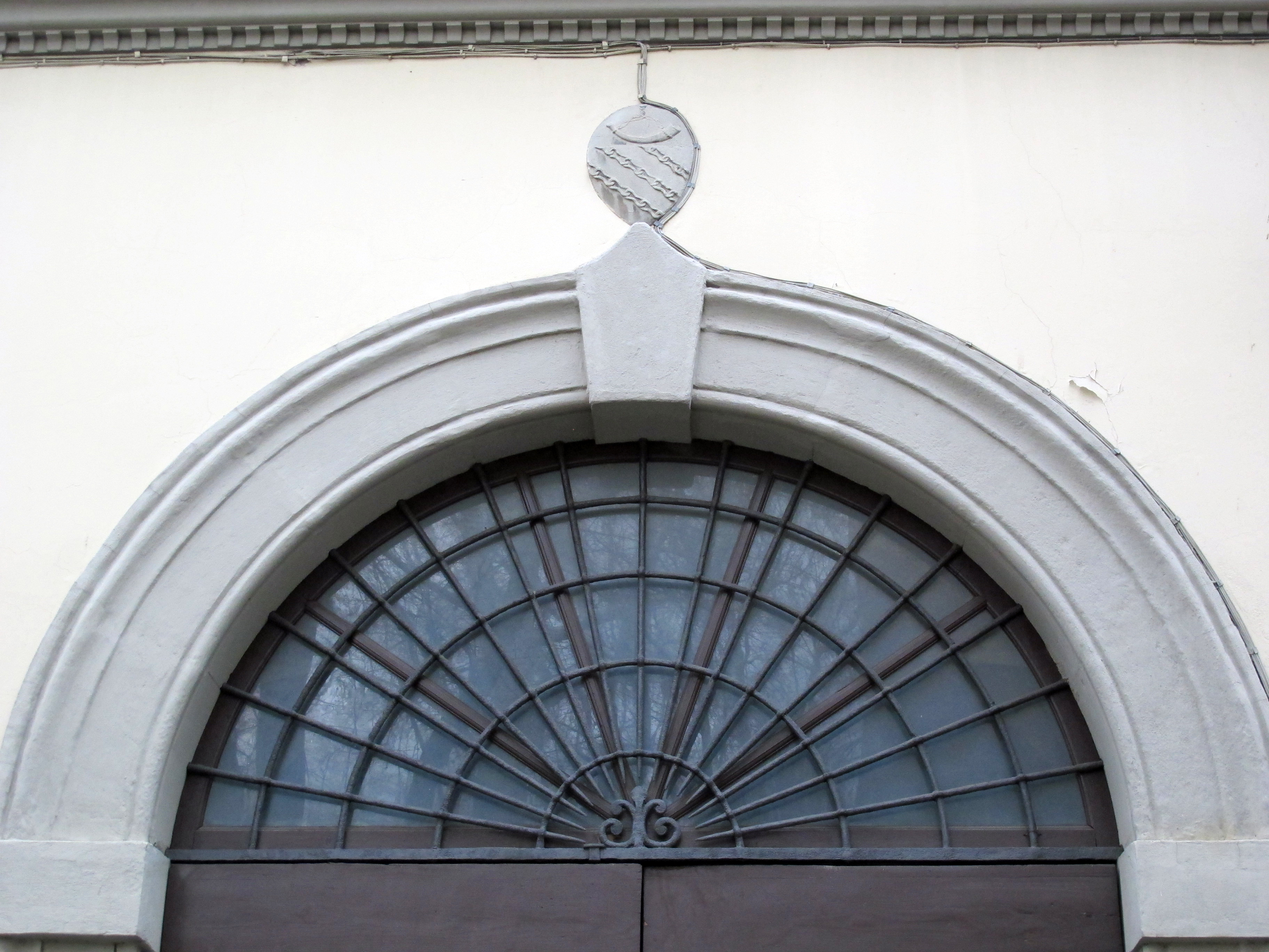 Via michelangelo buonarroti, palazzo gerini 04 porta